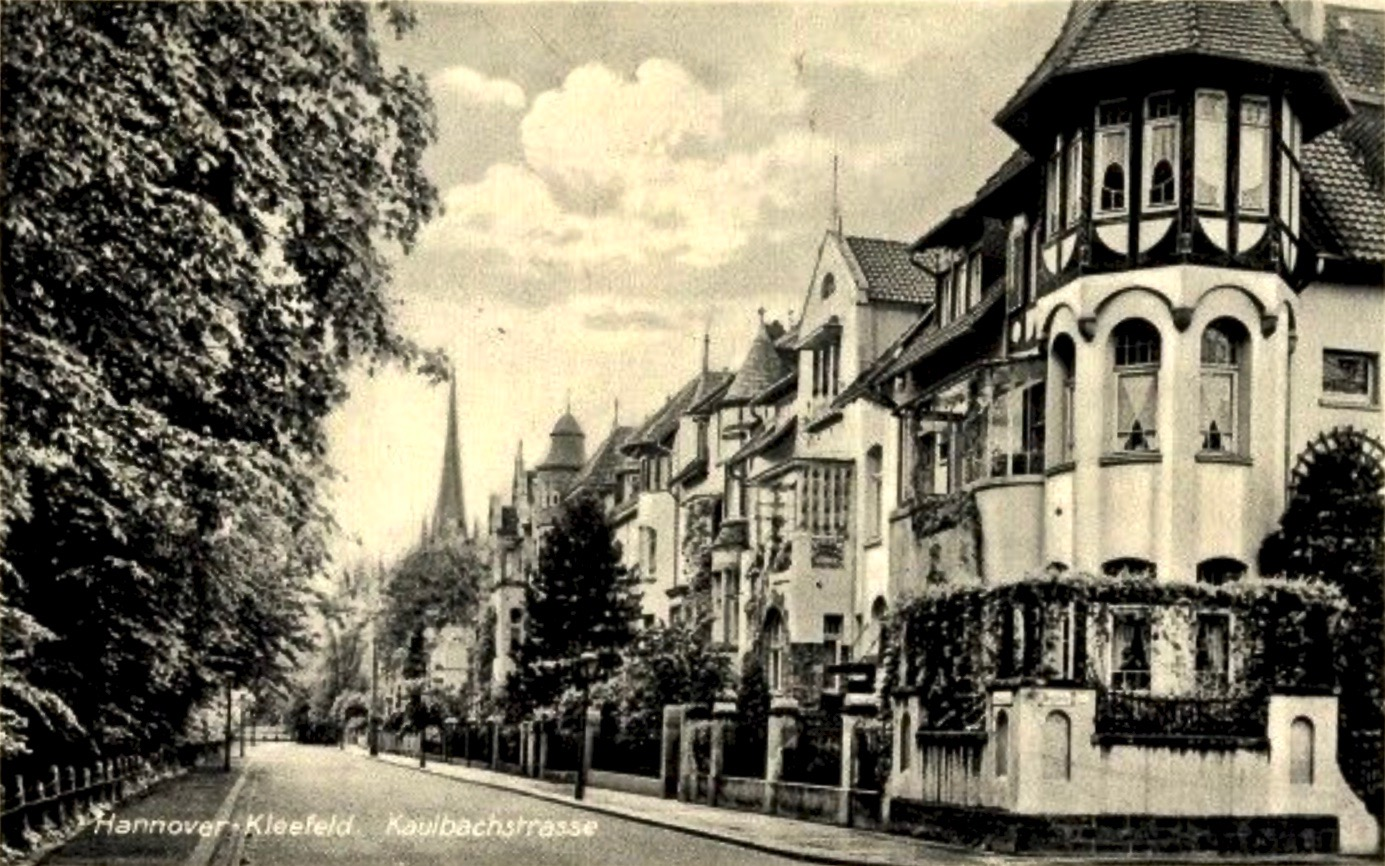 Häuserzeile in der Kaulbachstraße im Stadtteil Hannover-Kleefeld, zur Linken (westlich) an die Eilenriede (Stadtpark) grenzend